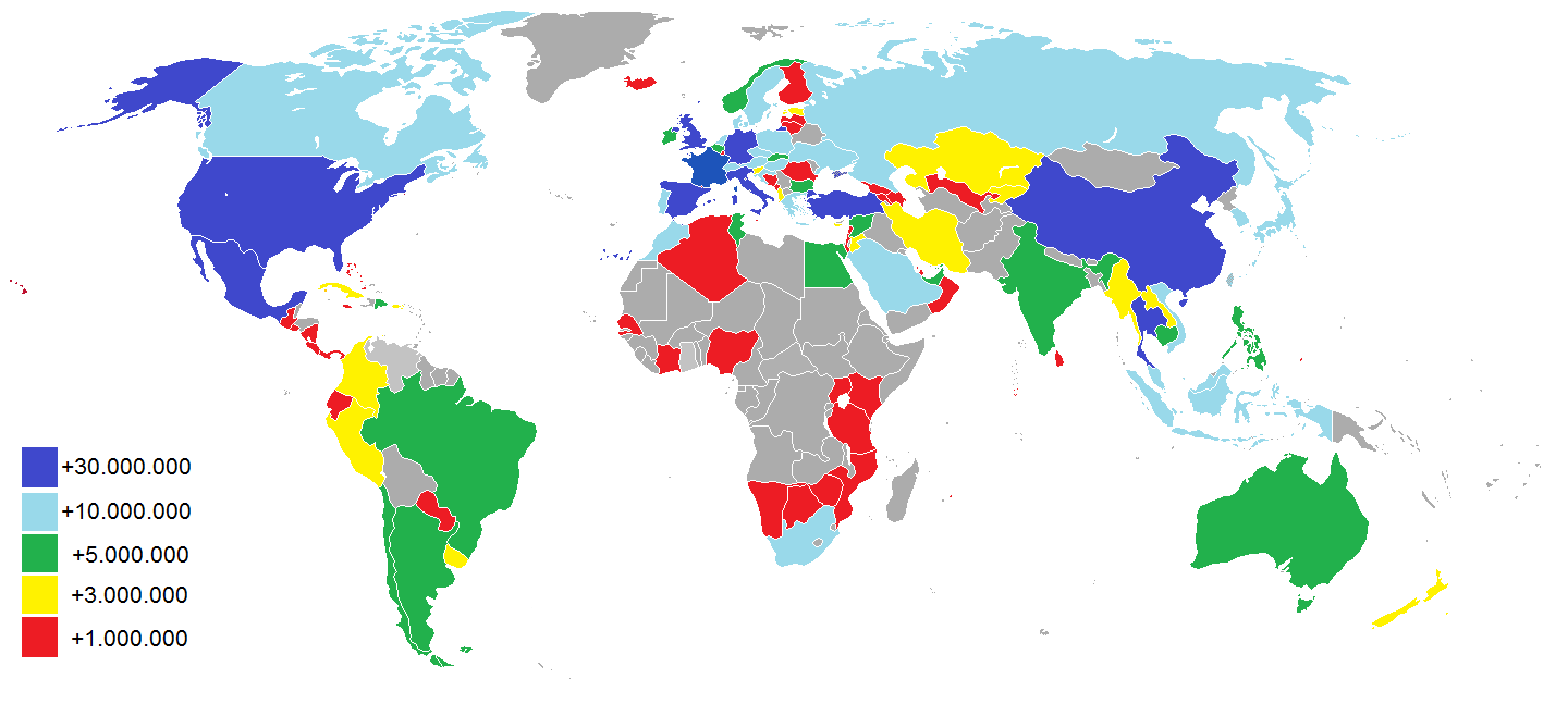 Mapa del turismo internacional en 2016